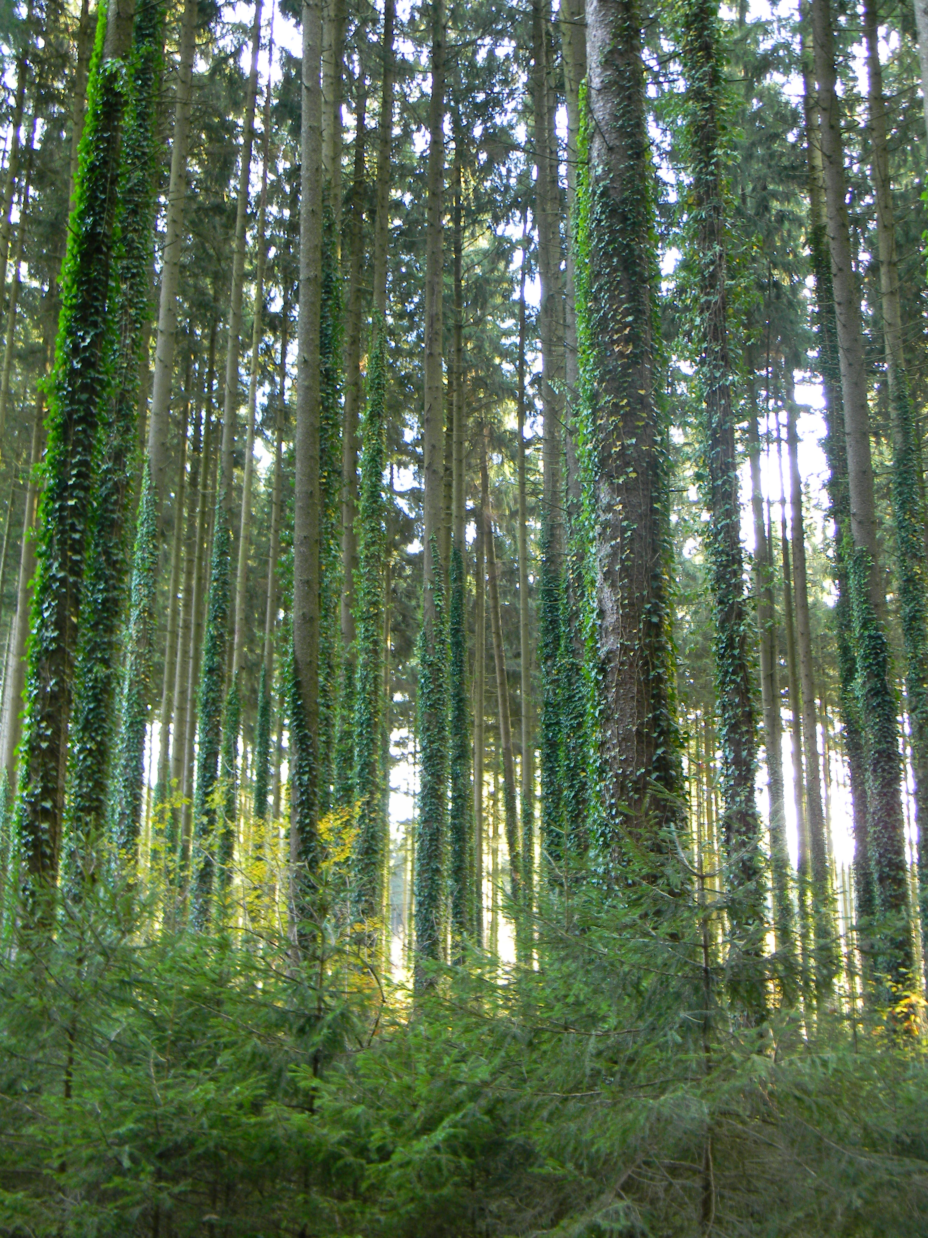 Fichten mit hochkletterndem Efeu im Westerholz bei Kaufering